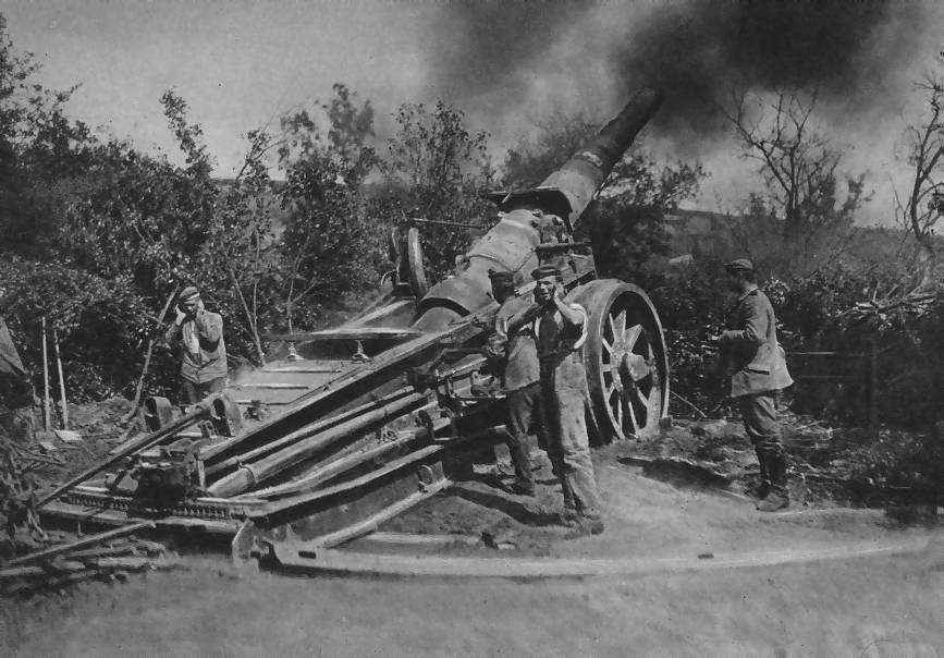 17 cm SK L/40 i.R.L. in azione su piattaforma di tiro